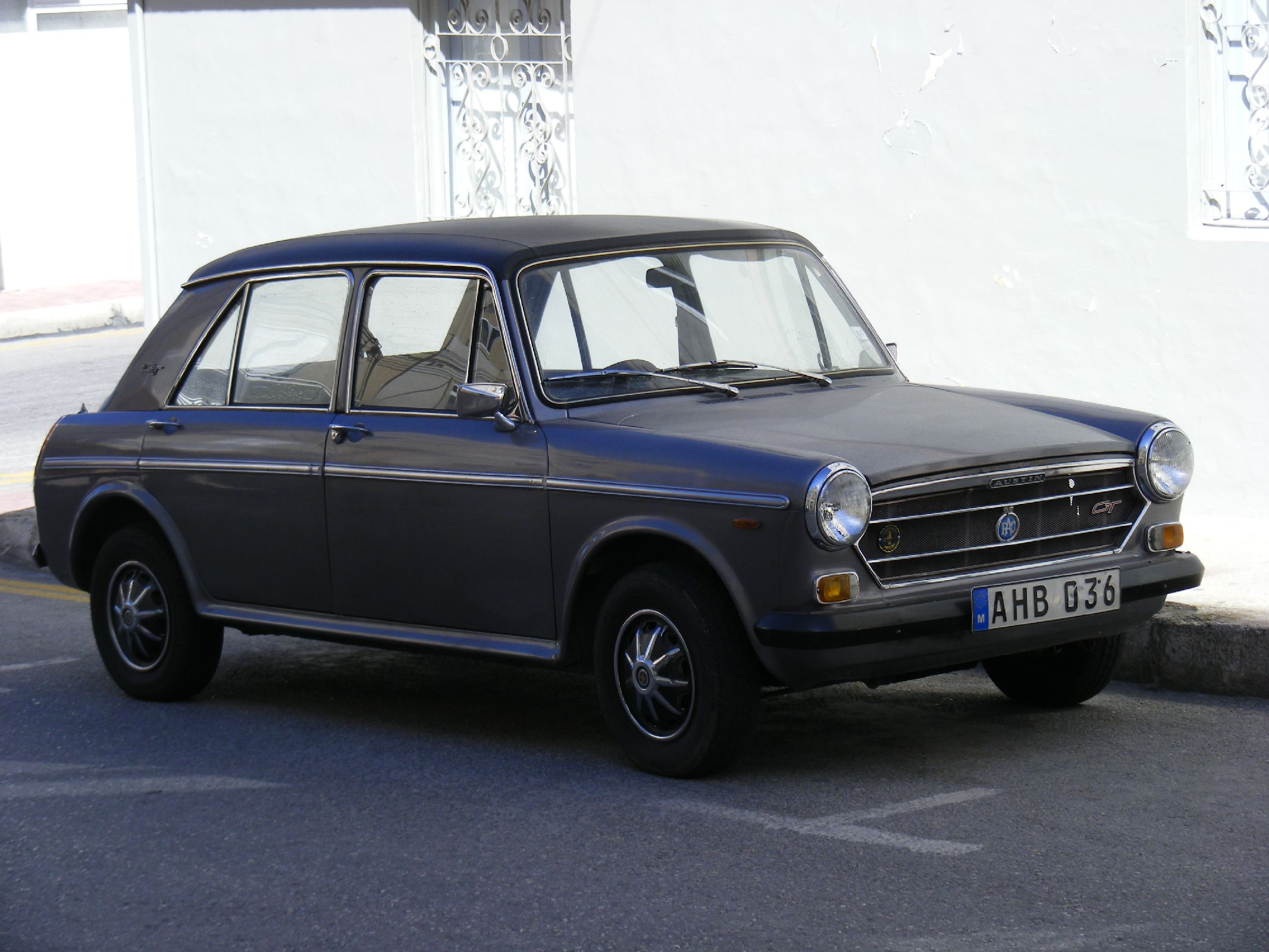 Austin 1100 Malta